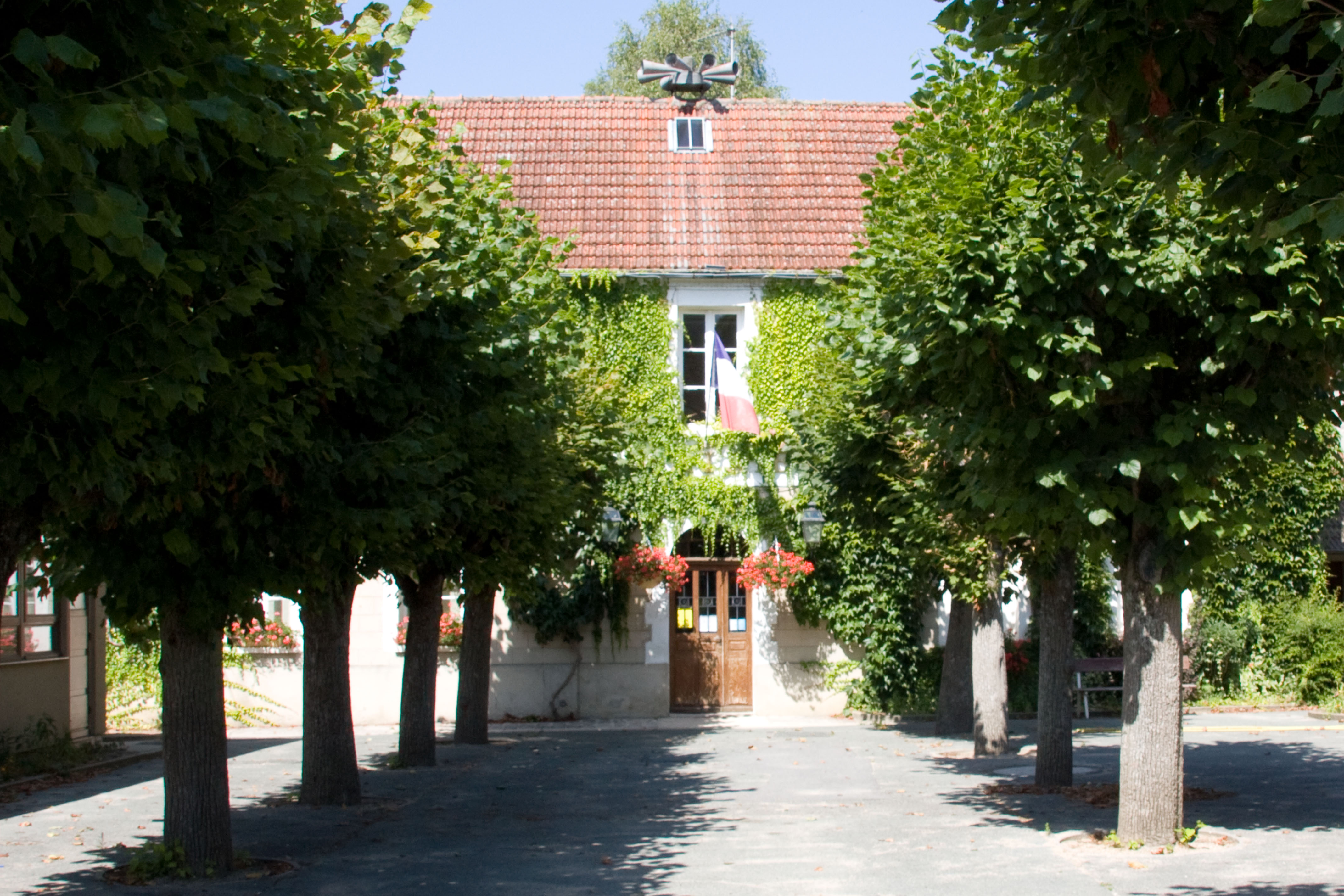 Mairie de Buno-Bonnevaux, Buno-Bonnevaux, Essonne, France